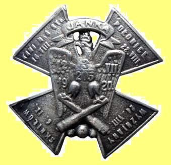 Odznaka pamiątkowa baterii "Janka" 205 ochotniczego pułku piechoty (1920 r.)